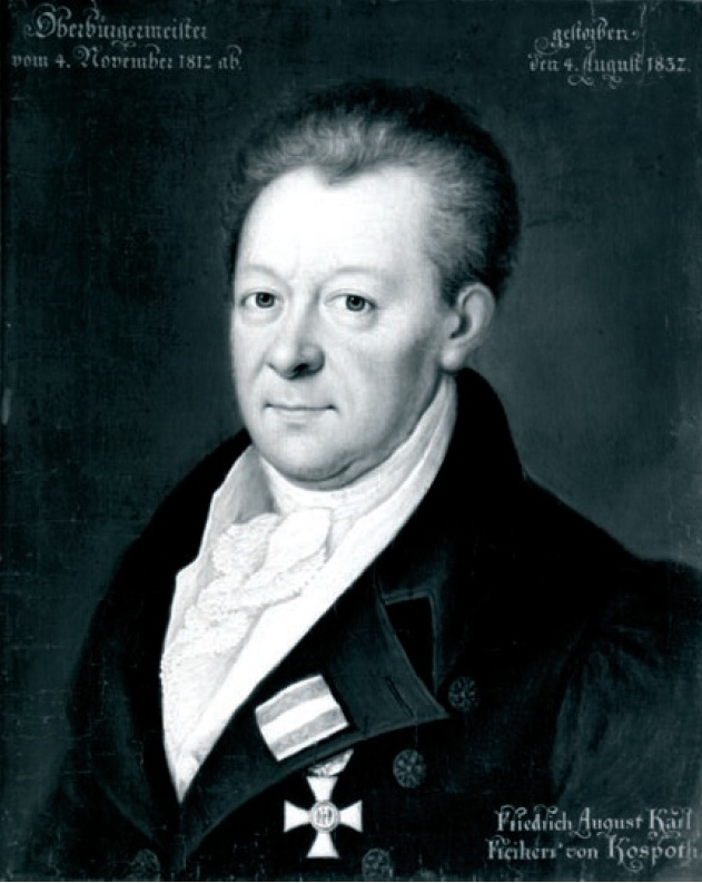 Bildnis Friedrich August Karl von Kospoth (1767–1832), Oberbürgermeister von Breslau